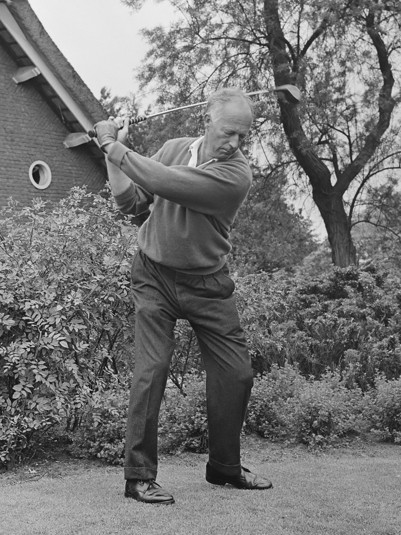 Koning Leopold in Eindhoven om mee te doen aan golfwedstrijden. Een van de deelnemers is ex-koning Leopold van Belgie 21 juni 1963